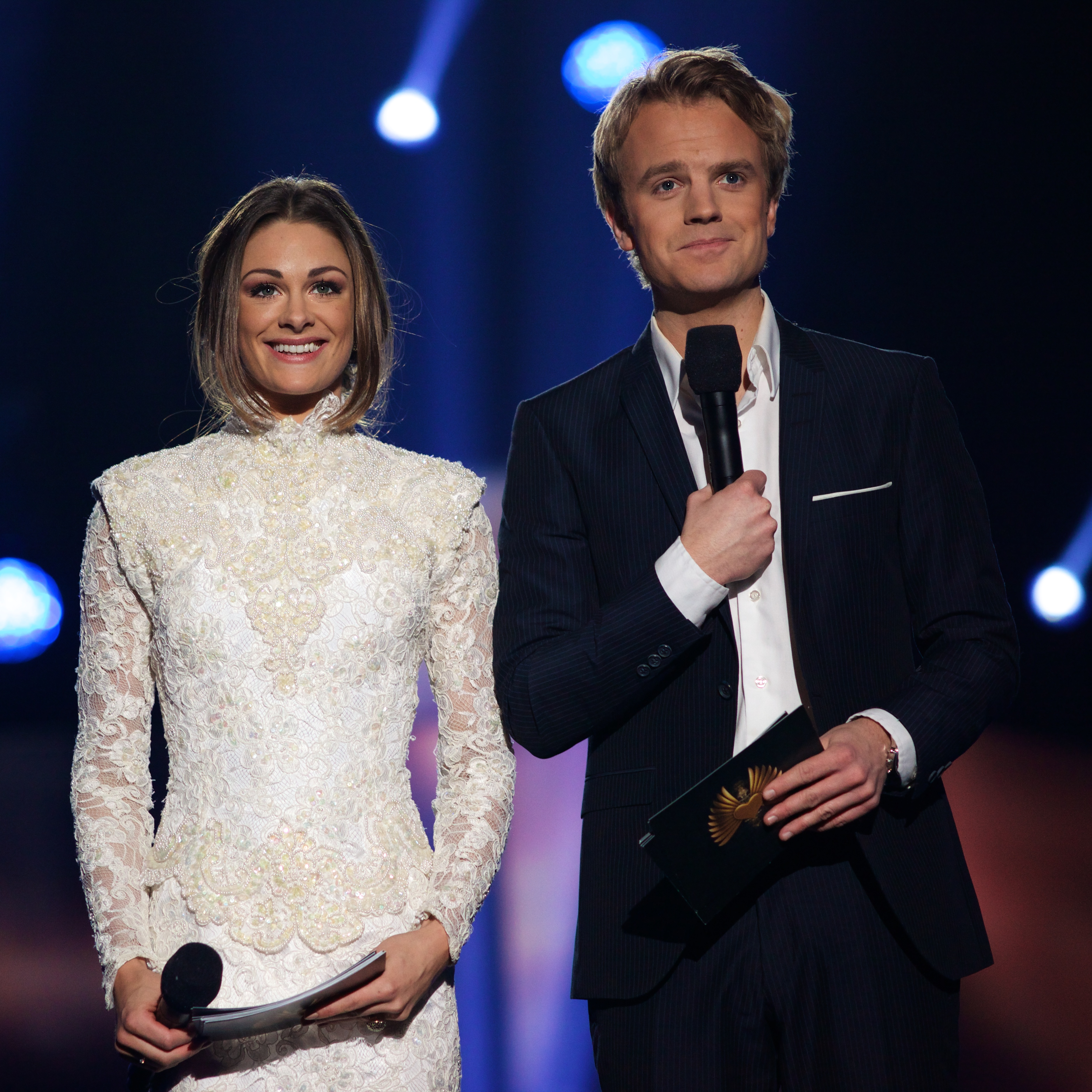 Programledere under Melodi Grand Prix 2013 delfinale i Larvik